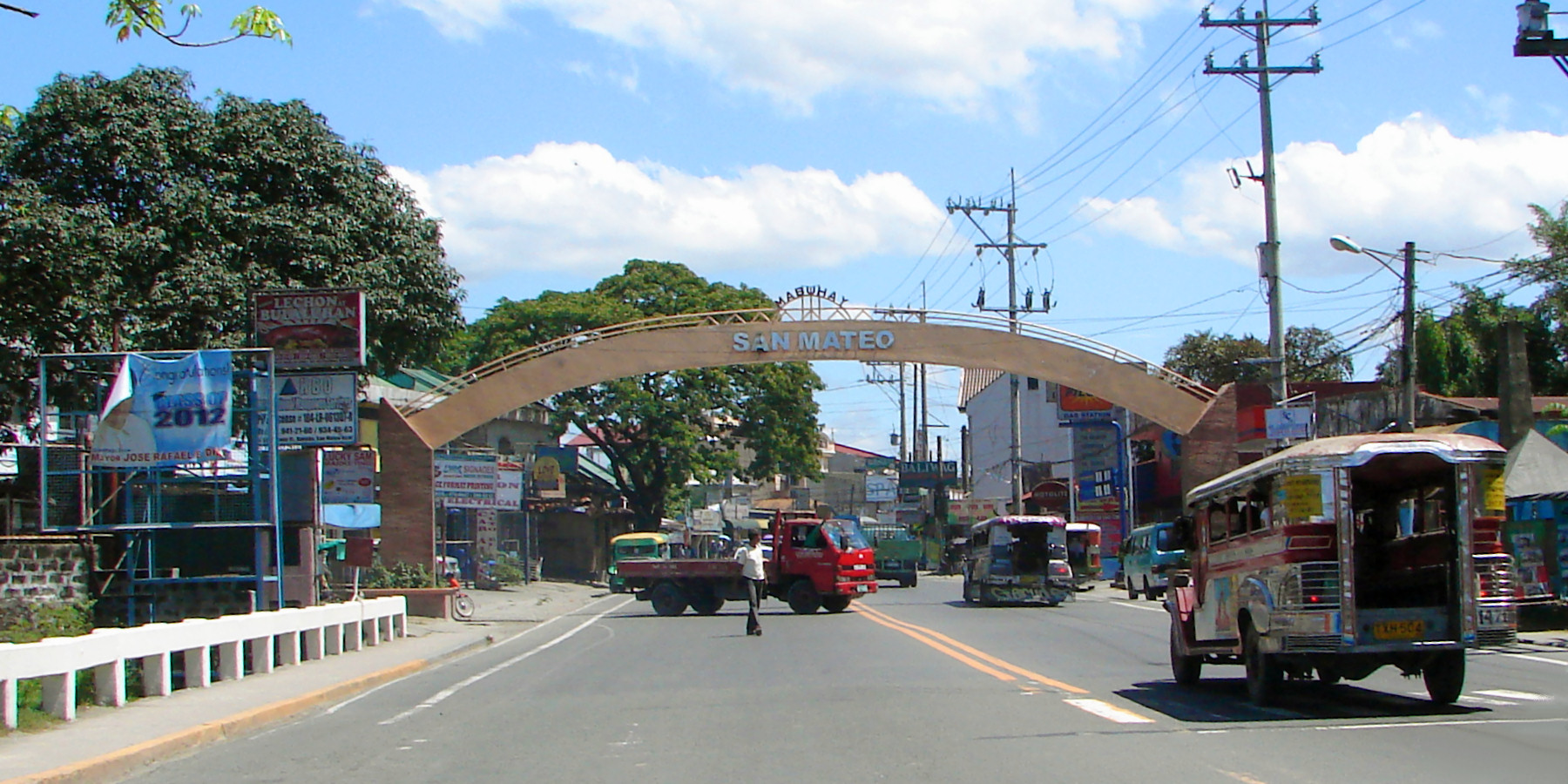 San Mateo, Rizal, Philippines